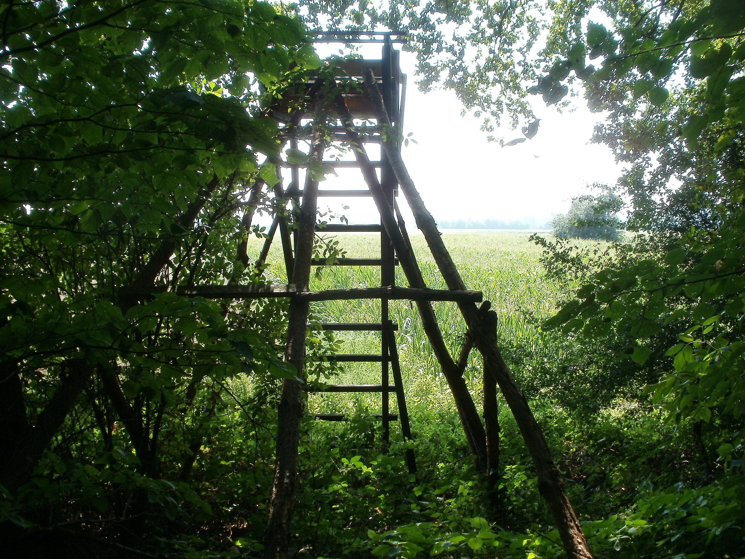 Hochsitz am Waldrand bei Hockenheim